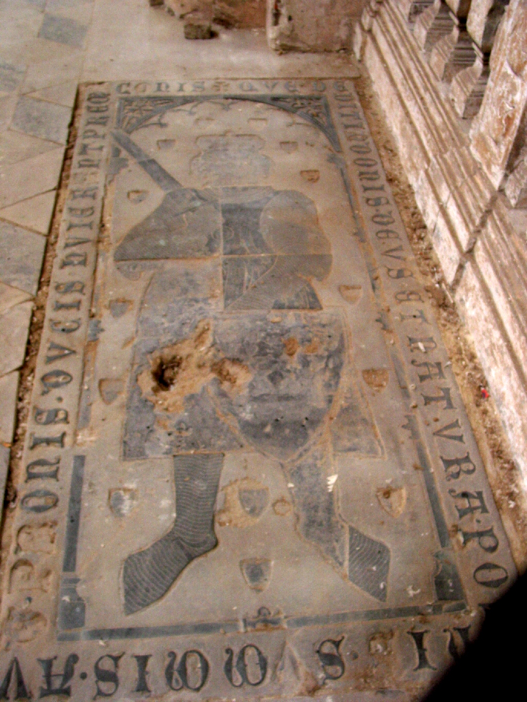 Grobowiec Przemka Ścinawskiego. Napis na płycie brzmi: "Que dedit in donis Deus et natura Polonis * Summis aut pronis * Ducis erant Premeconis"